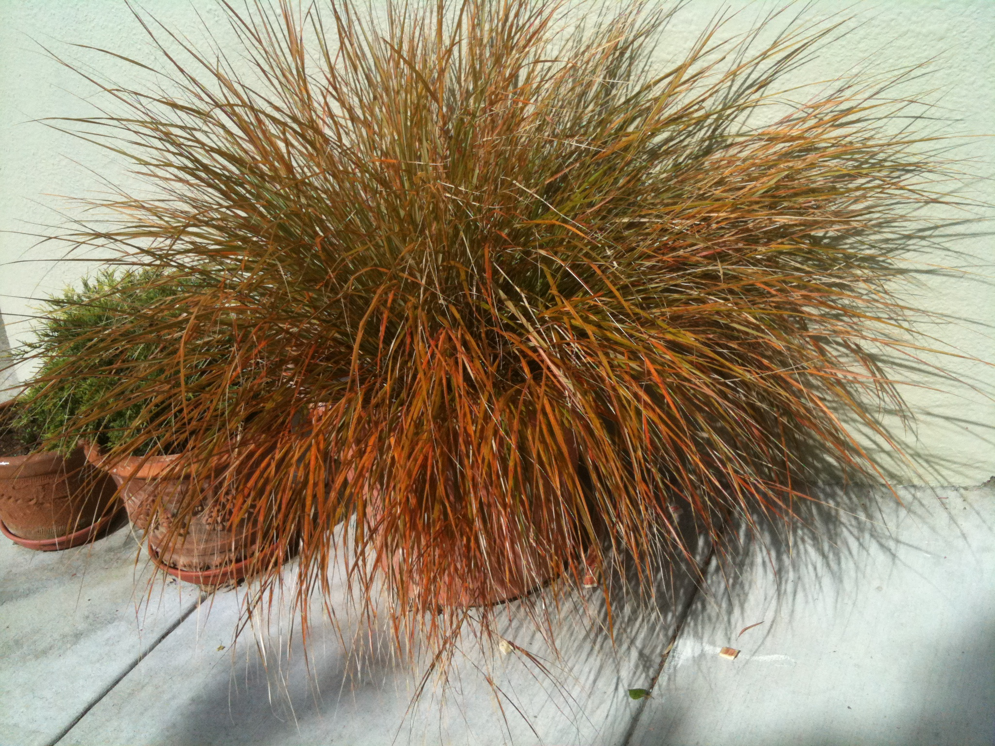 Carex testacea 2